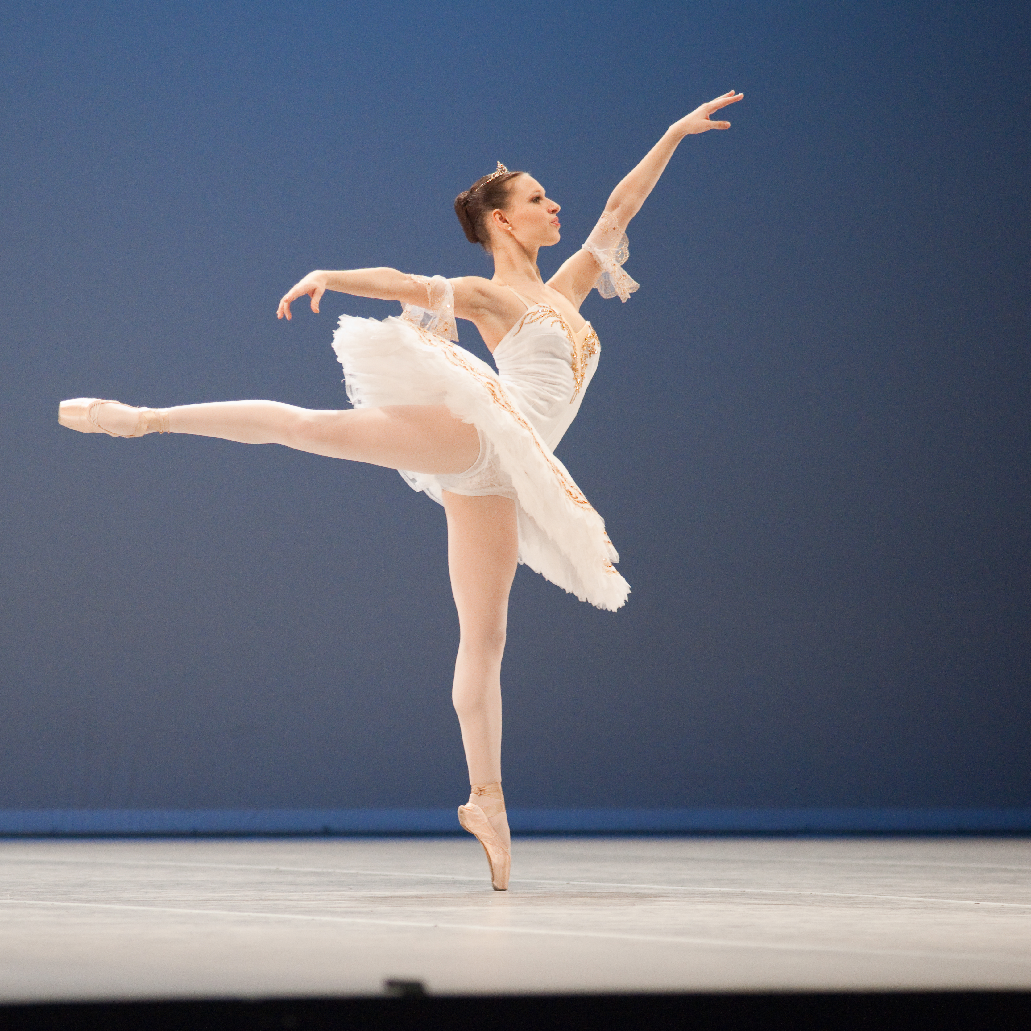 Variation extraite de Raymonda au Prix de Lausanne 2010. The making of this document was supported by Wikimedia CH. (Submit your project!) For all the files concerned, please see the category Supported by Wikimedia CH.